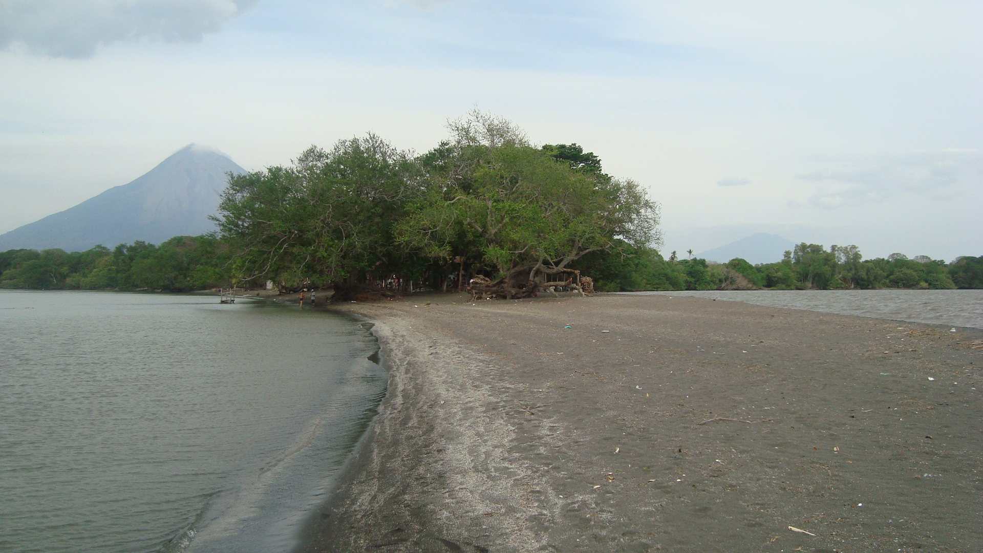 La du vulkanoj de la ometepe insulo.